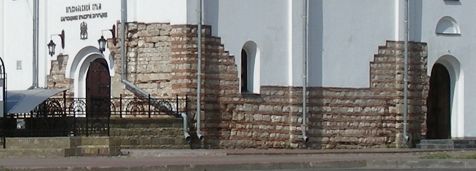 VITEBSK. Annunciation (Дабравешчанская) church (XII century).